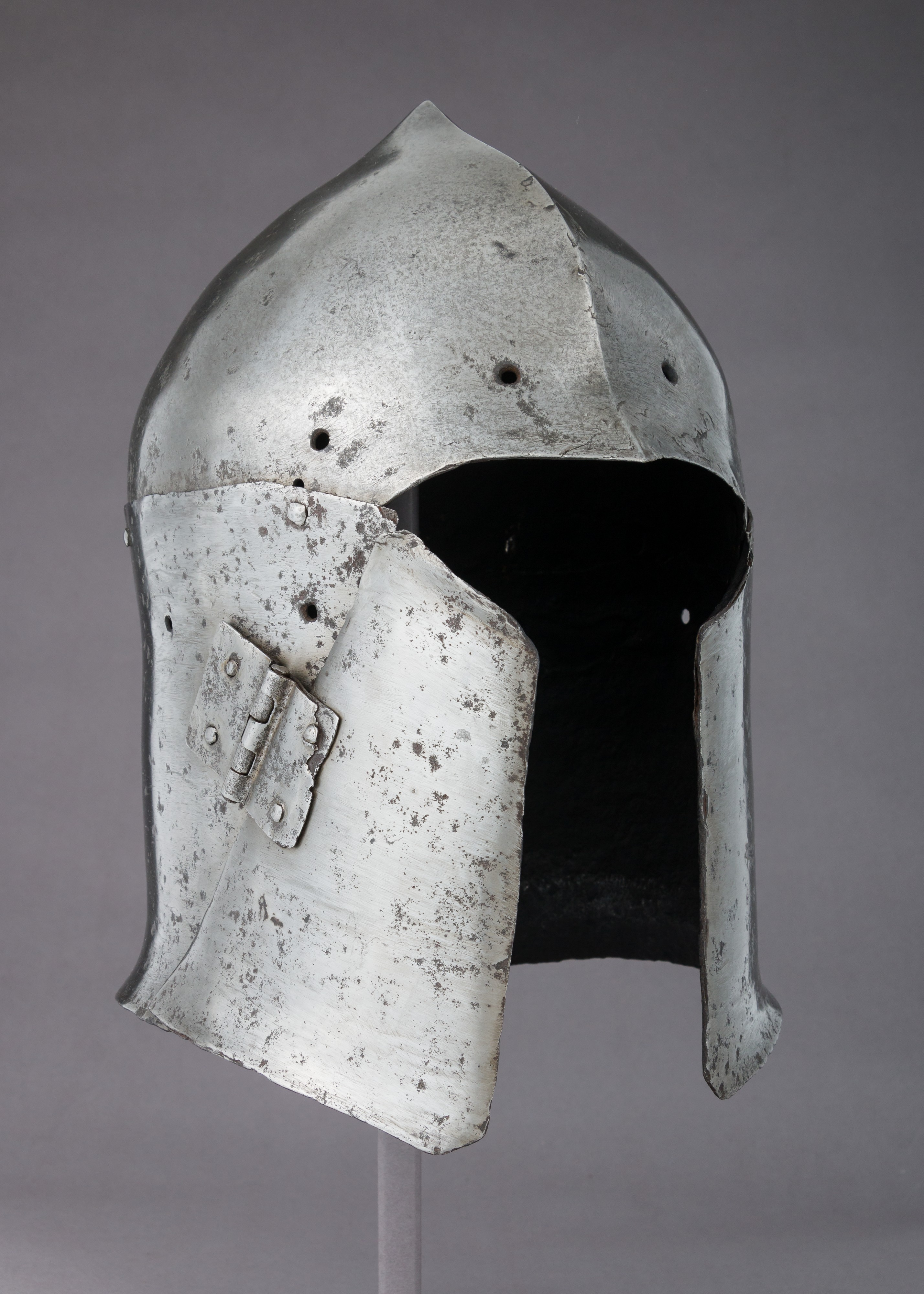 Italian; Bascinet; Helmets